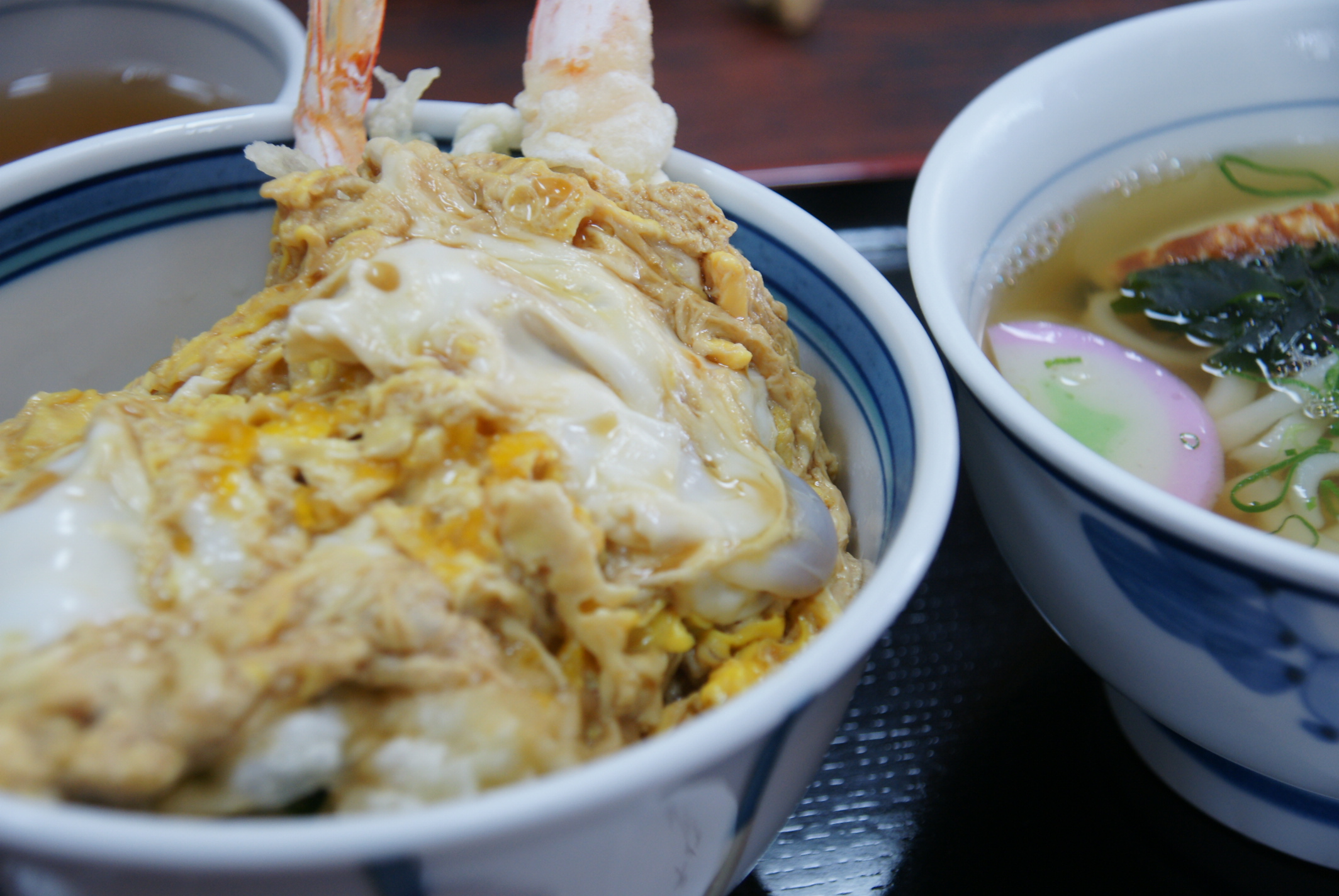 高砂一休の天玉丼